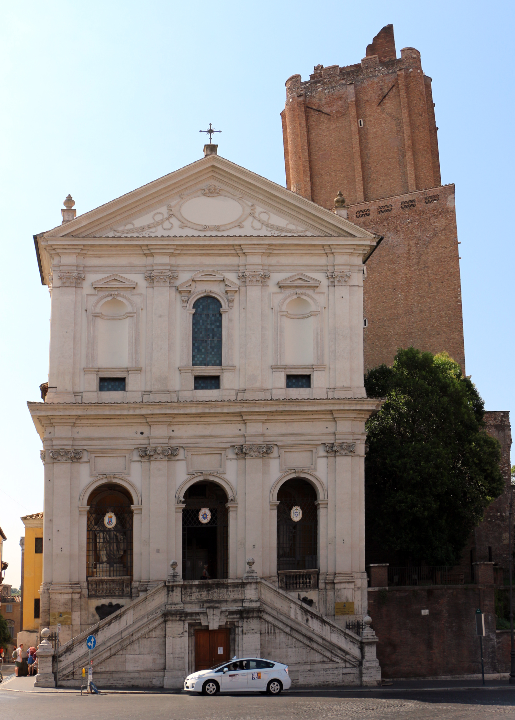 Roma, chiesa di santa caterina a magnanapoli, esterno 01.JPG